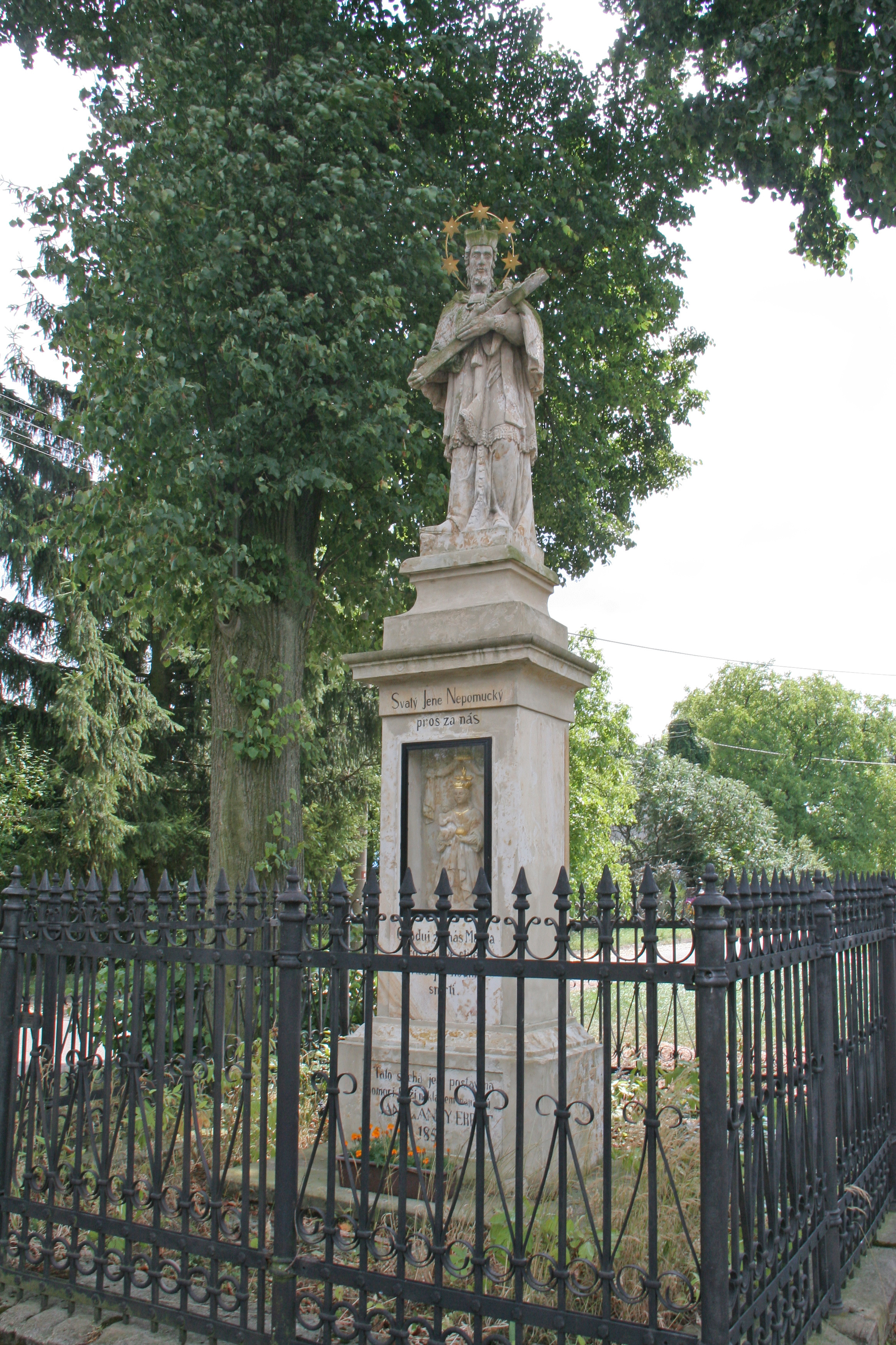 Trotinka svatý Jan Nepomucký